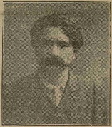 Panait Musoiu